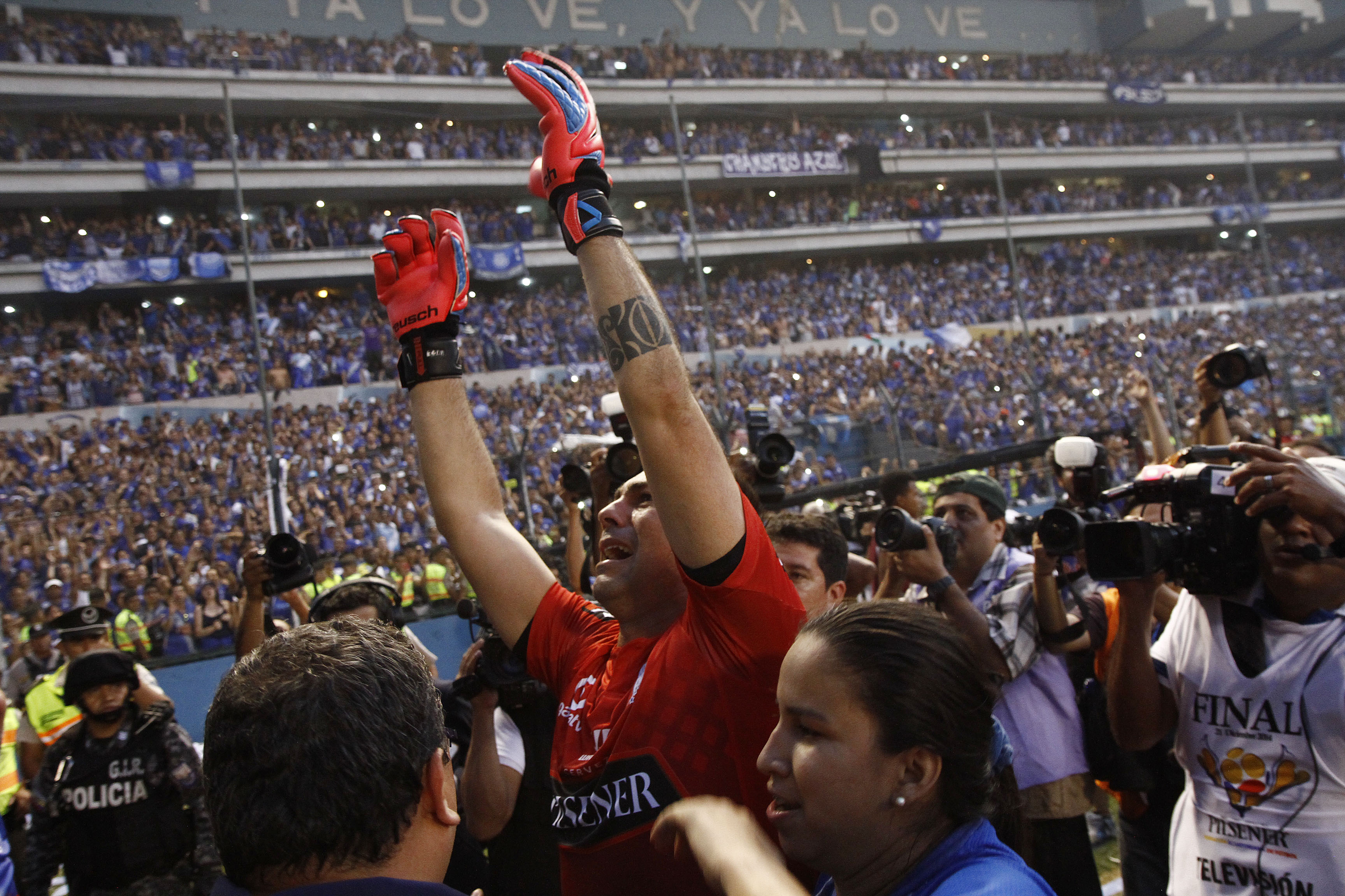 Guayaquil, Ecuador, 21 dic (ANDES).- El conjunto guayaquileño Emelec conquistó este domingo la edición 57 del campeonato ecuatoriano de fútbol. Foto: Micaela Ayala V./ANDES